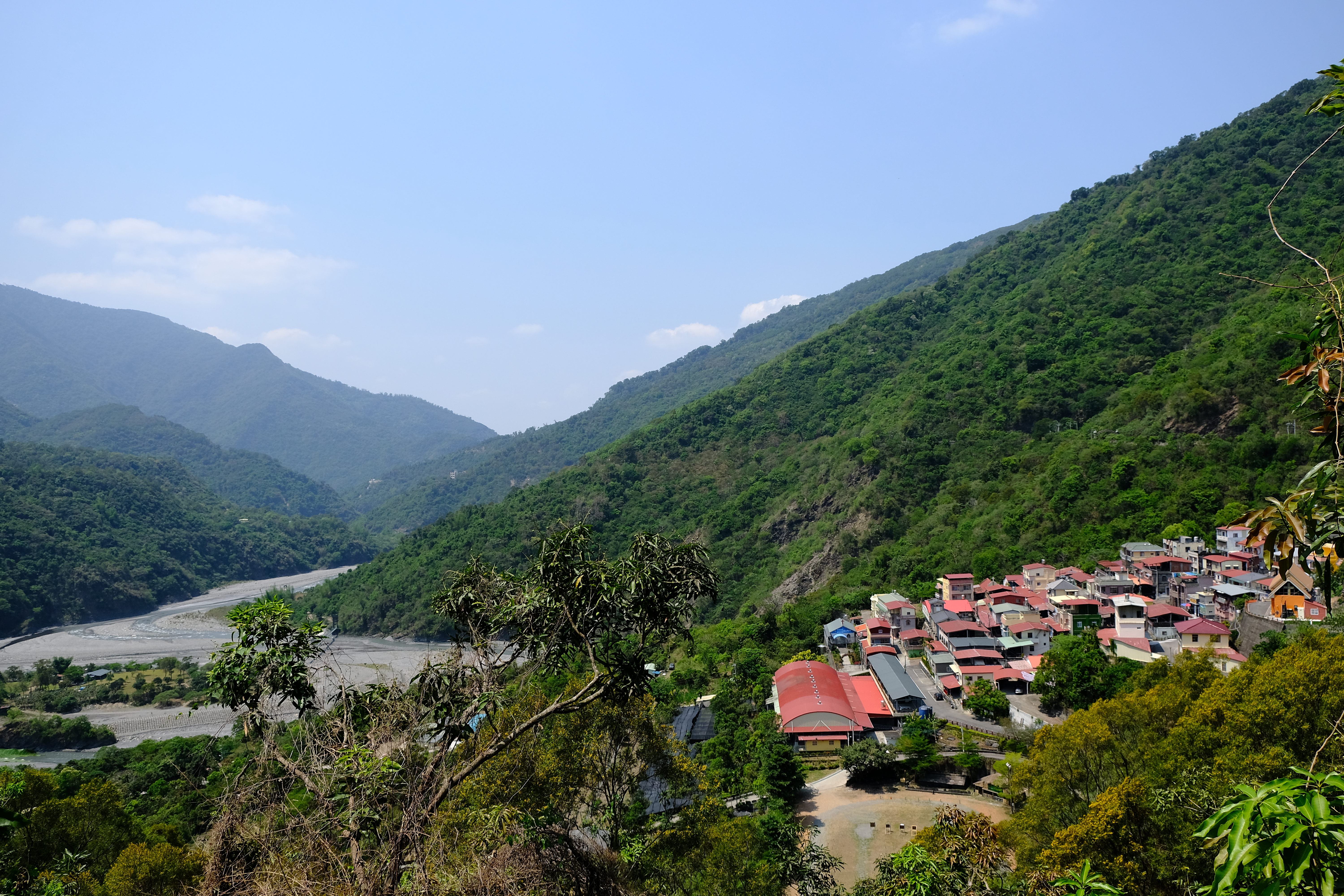 中文（台灣）: 2019 高雄市茂林區萬山部落 Wanshan Village Kaohsiung Taiwan